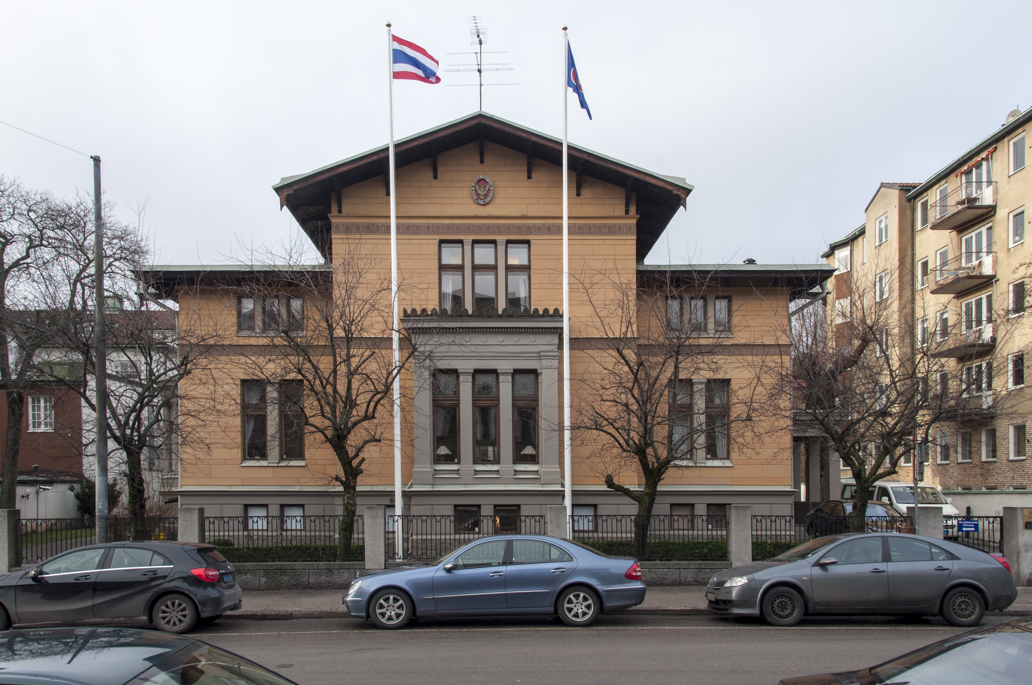 Linden 12, Floragatan 3, Nybyggnadsår 1880 Carl Aug. Olsson (Byggmästare) Carl Curman (Byggherre) Fritz Eckert (Arkitekt)